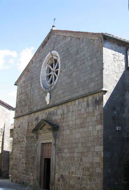 Pieve delle Sante Flora e Lucilla,Santa Fiora,Grosseto,Facade Pieve delle Sante Flora e Lucilla, Santa Fiora, Italy - Andrea della Robbia's work